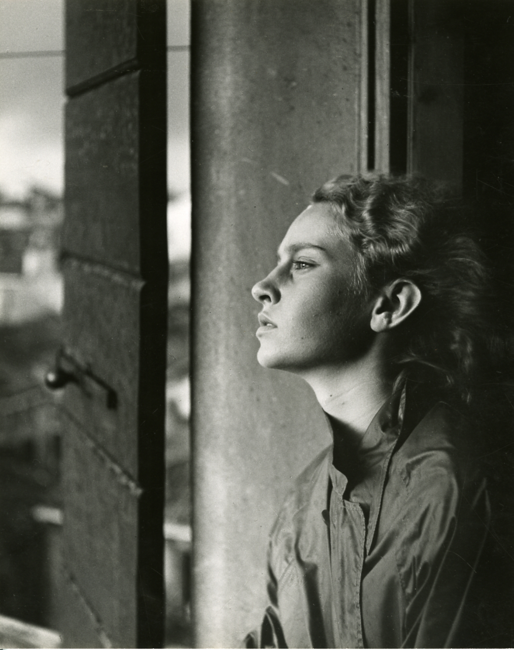 Servizio fotografico : Italia, 1955 / Paolo Monti. - Stampe: 7 : Positivo b/n, gelatina bromuro d'argento/ carta, 24x30. - ((Al verso di una delle stampe manoscritto: "Vetro macchiato 1951", "16 anni", "1955 Meme, ritratto a mezzogiorno", "1951", "Paolo Monti 1949". Sul coperchio della scatola manoscritto: "Ritratti".